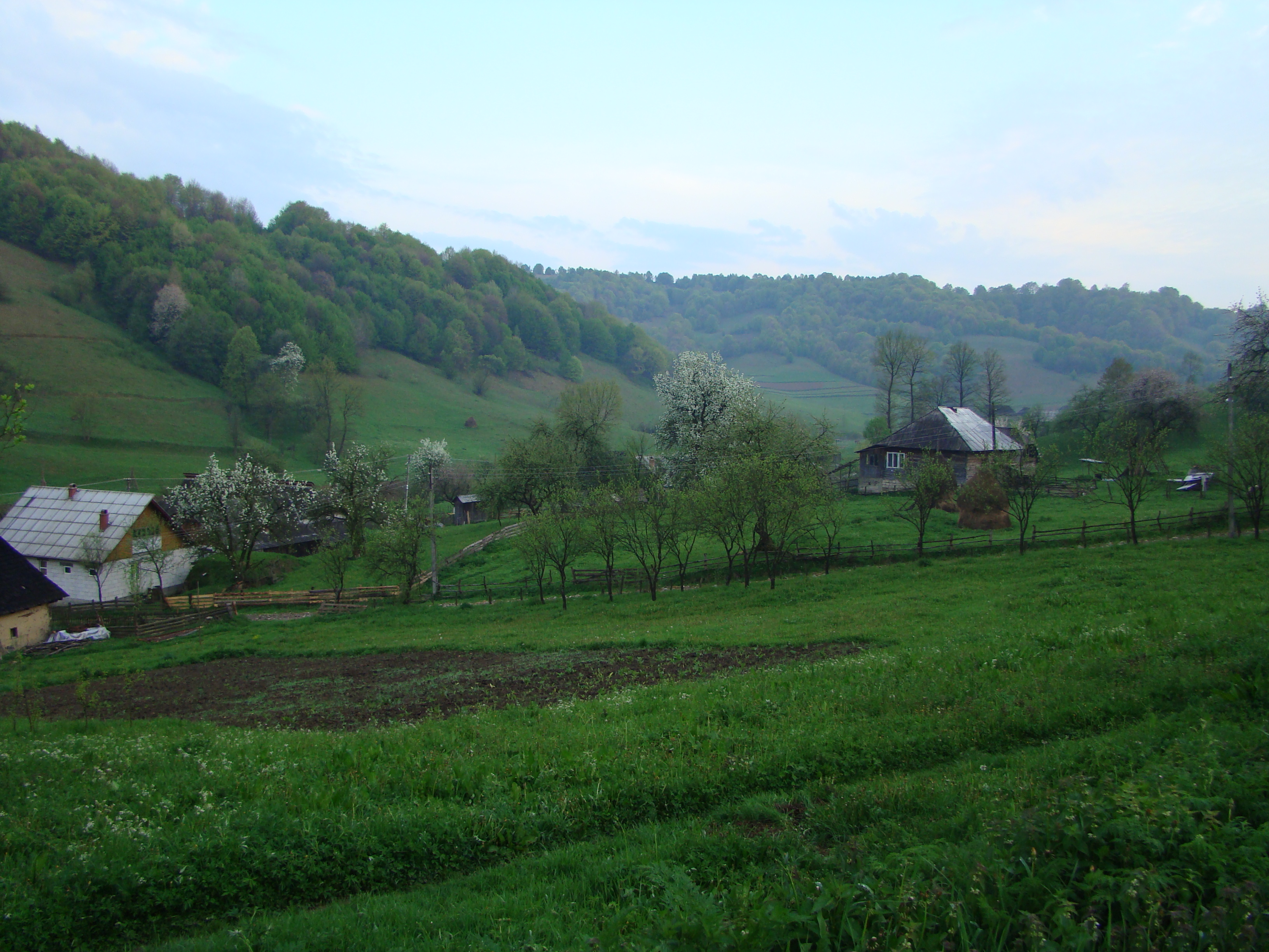 Biserica de lemn „Sf.Dumitru” din Larga, județul Maramureș